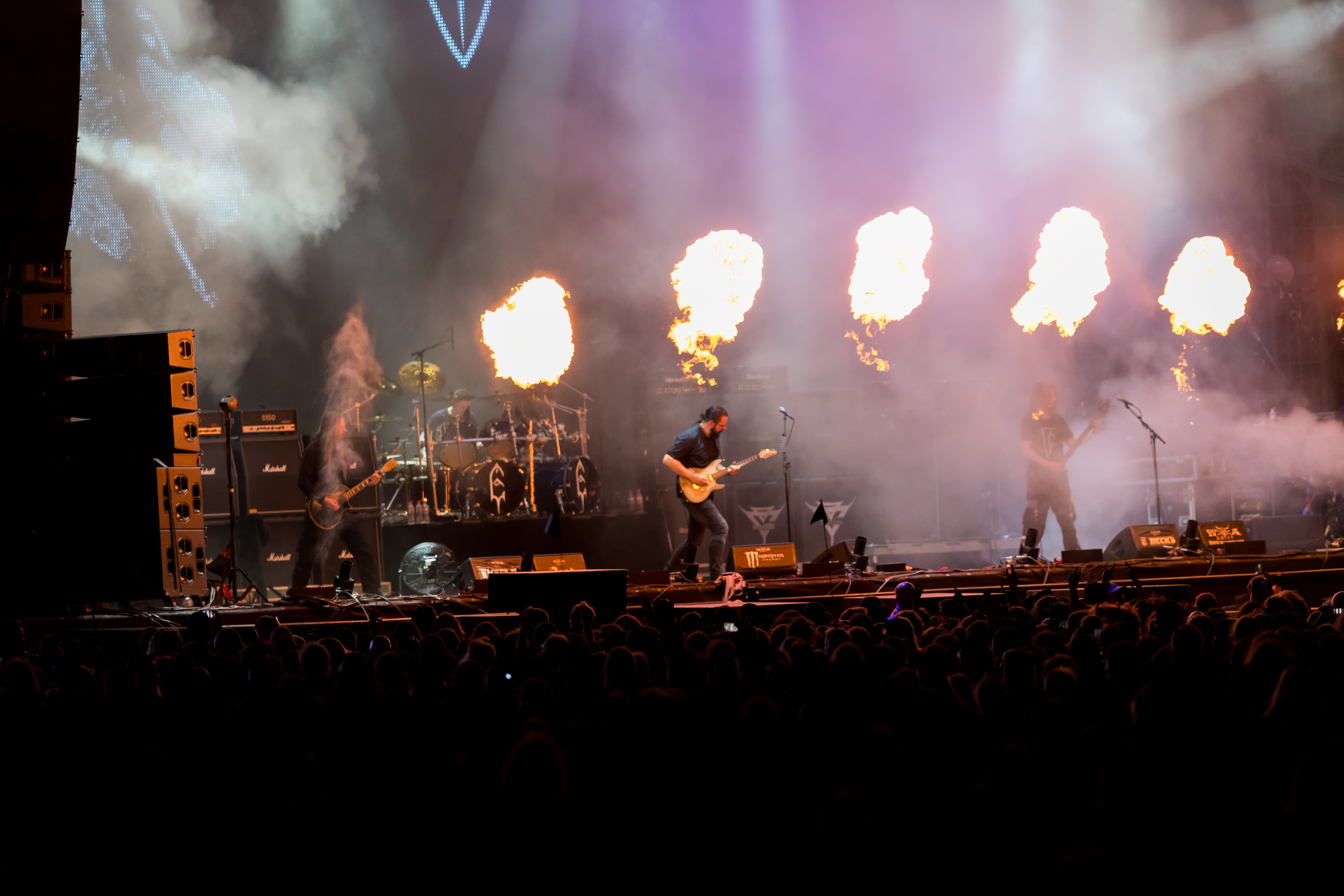 Emperor during Wacken Open Air at Schleswig-Holstein, Wacken, , Germany on 2017-08-04, Photo: Sven Mandel